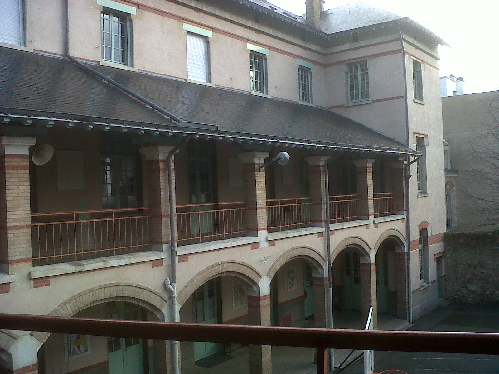 Bâtiment Administratif.